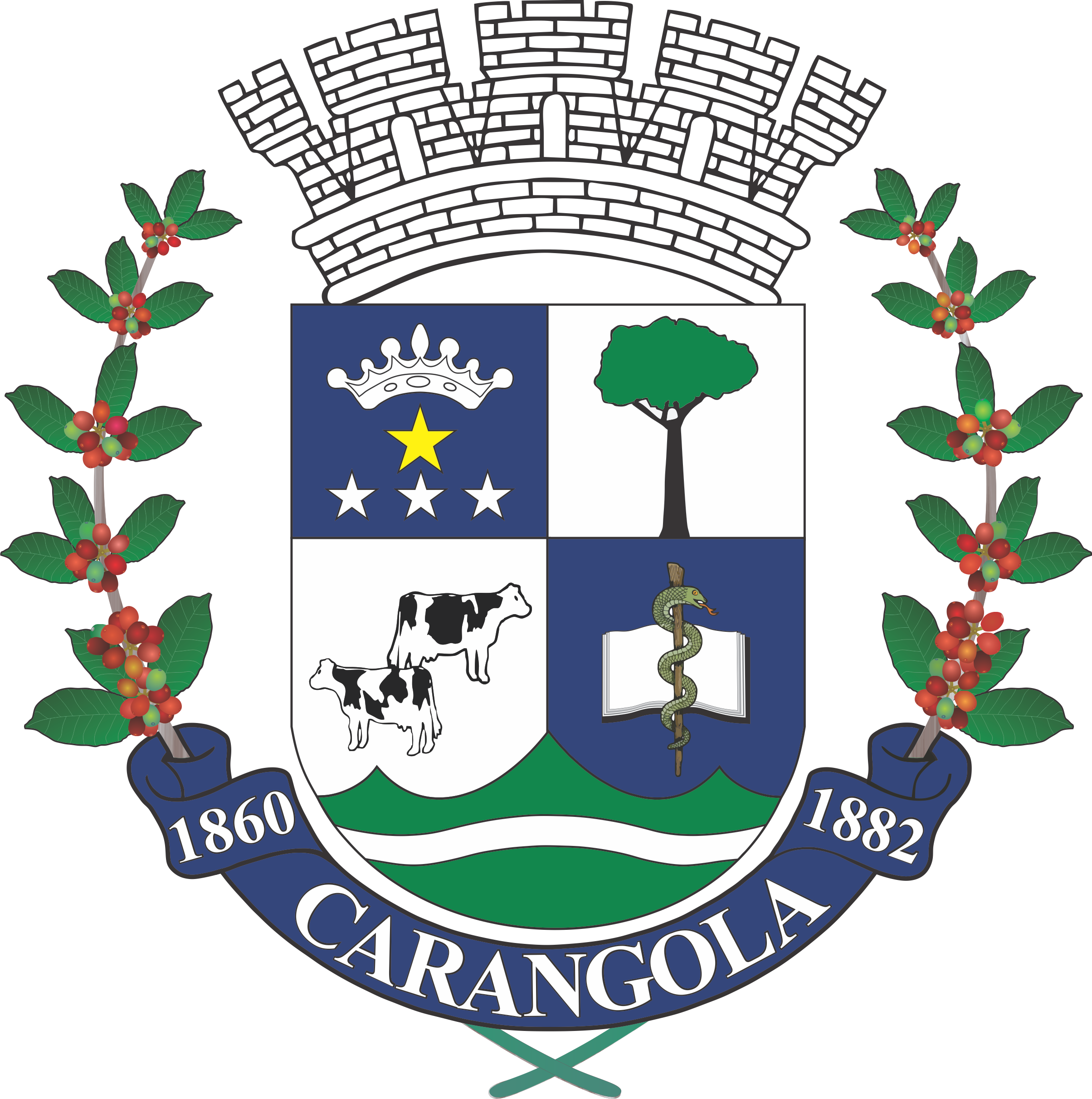 Brasão do Município de Carangola, Minas Gerais